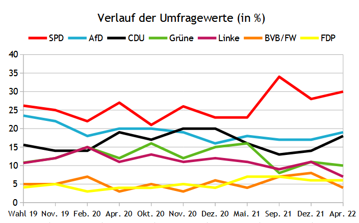 Brandenburg-Wahl 2024 Umfragen